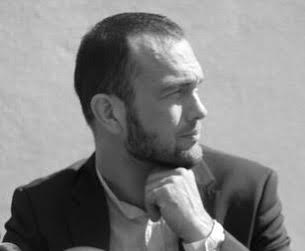 Jari Virman